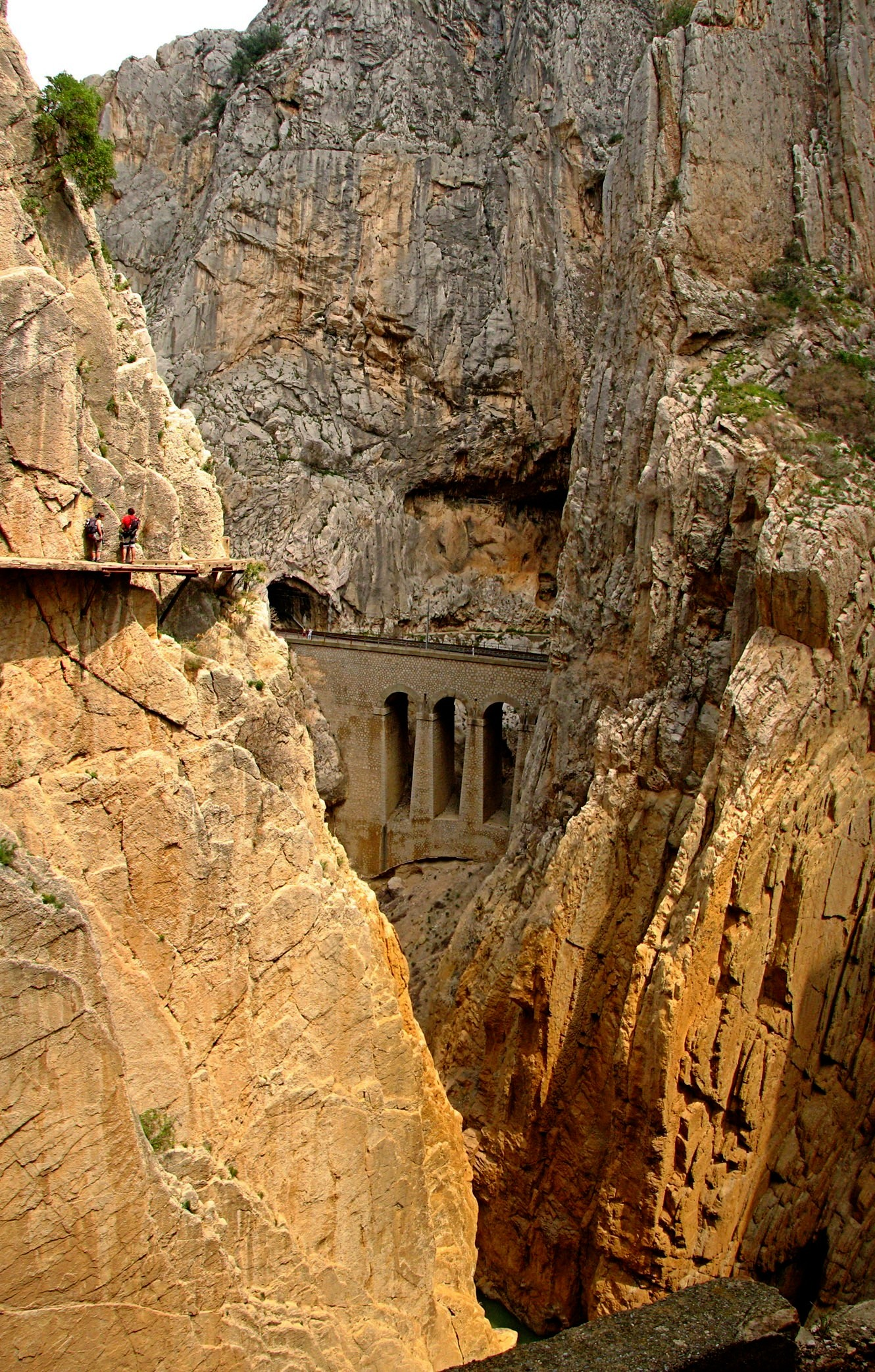 Caminito del Rey in El Chorro (Málaga, Spain).jpg